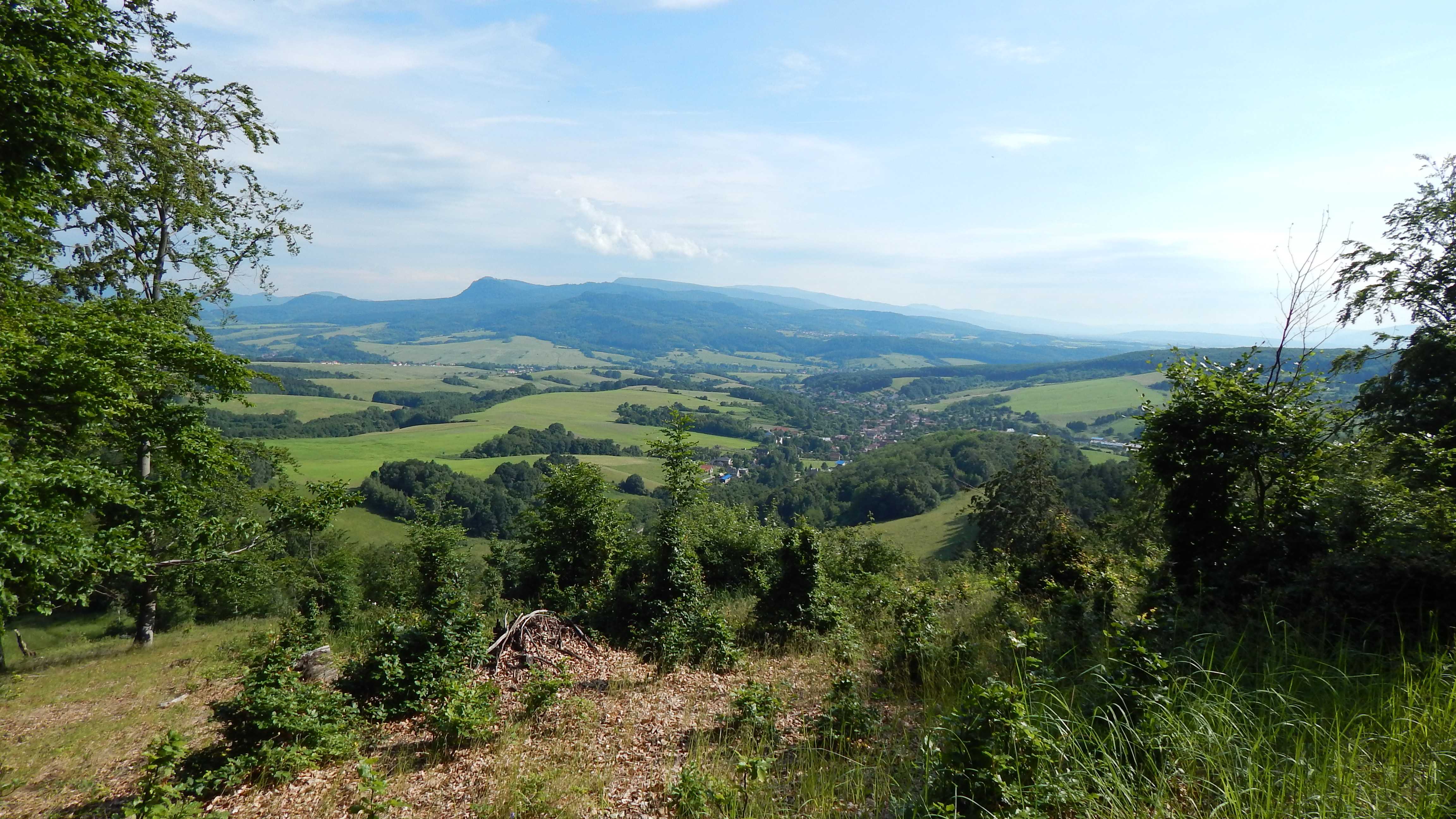 971 01 Malá Čausa, Slovakia